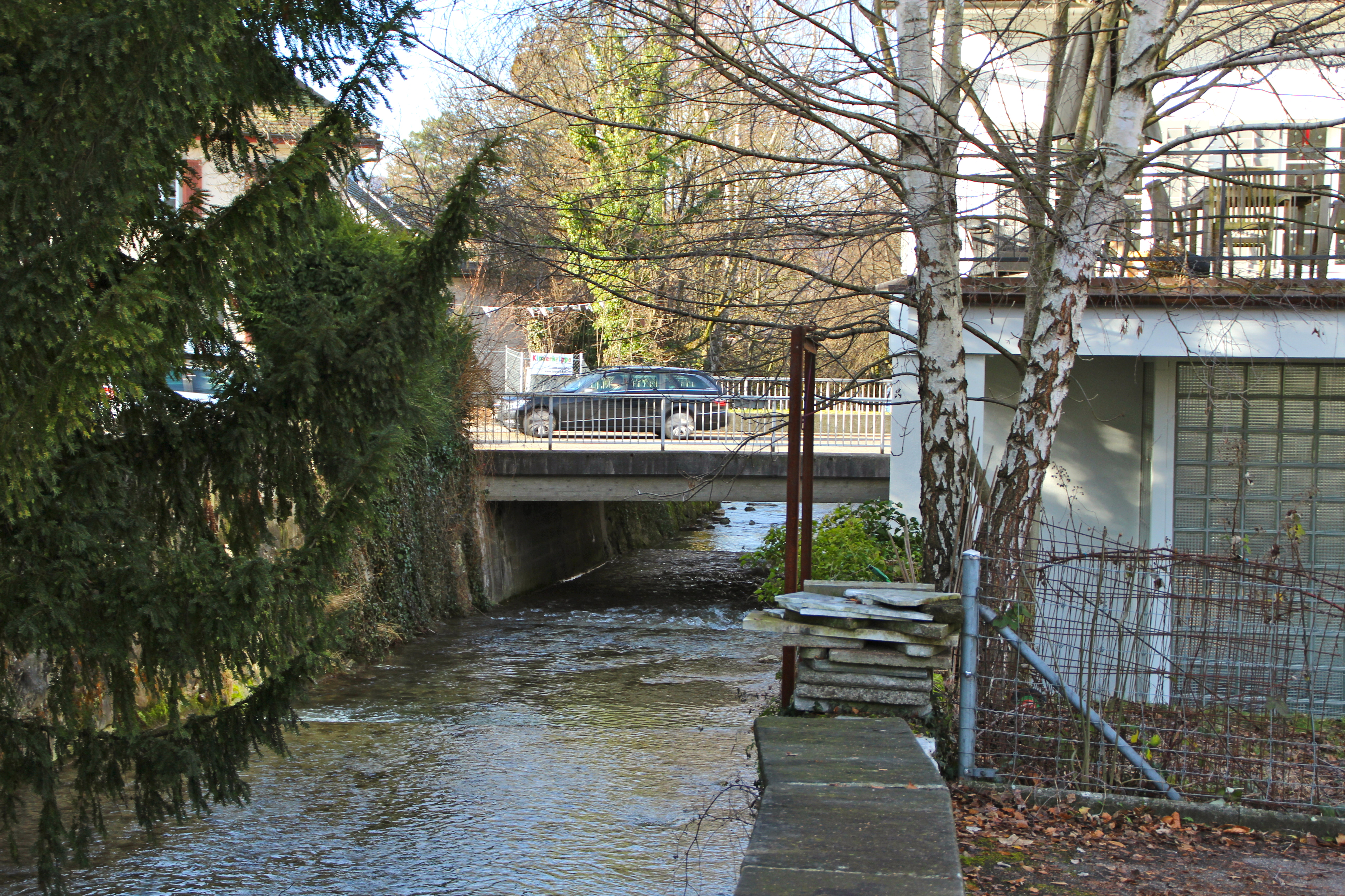 Brücke Dorfbach - Seestrasse; oder der Ursache der Küsnachter Überschwemmung 1878